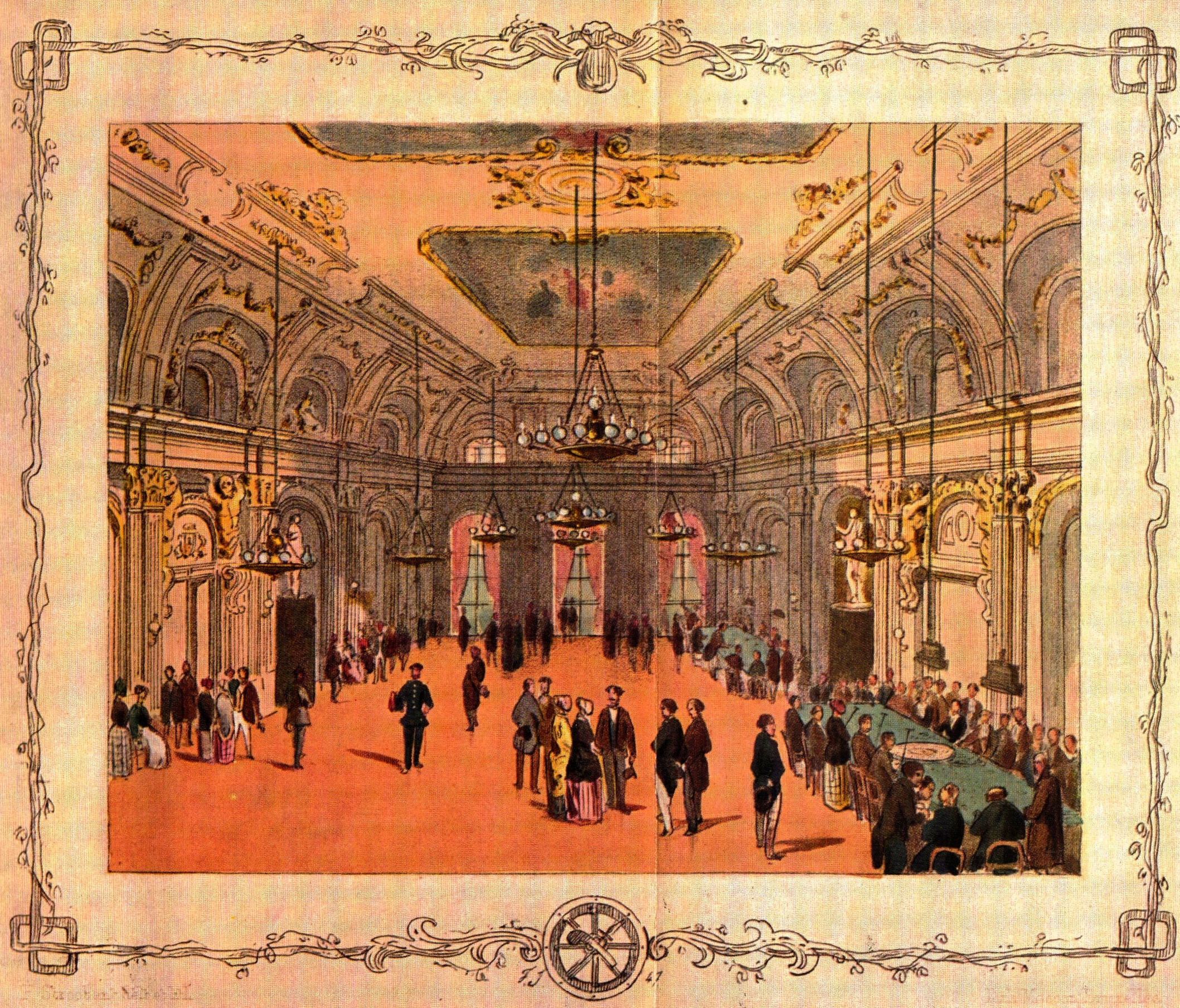 Lithographie "Intériere de la Redoute. A Aix'la Chapelle (18,8 x 23,2 cm) aus dem Bilderzyklus: Monuments et vues 'Aix la Chapelle (Bruxelles)